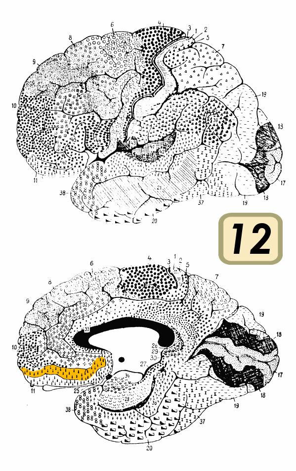 Brodmann area 12.